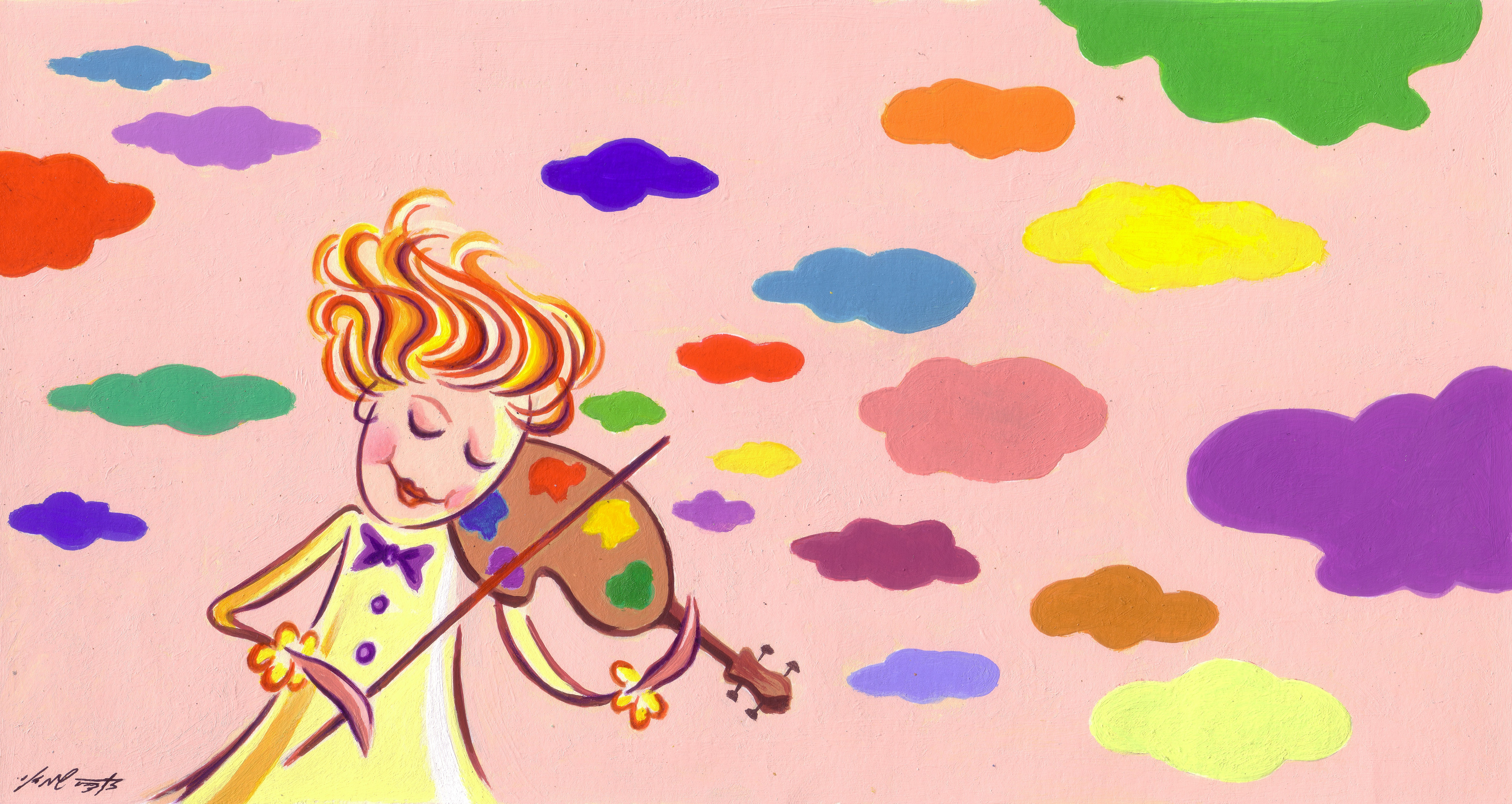 צלילי ילדות